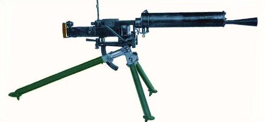 Mitragliatrice FIAT modello 14 equipaggiata con spegnifiamma. Si distingue dal successivo modello 14/35 per il manicotto di raffreddamento della canna, dal quale sporgono i raccordi di collegamento con il serbatoio dell'acqua.